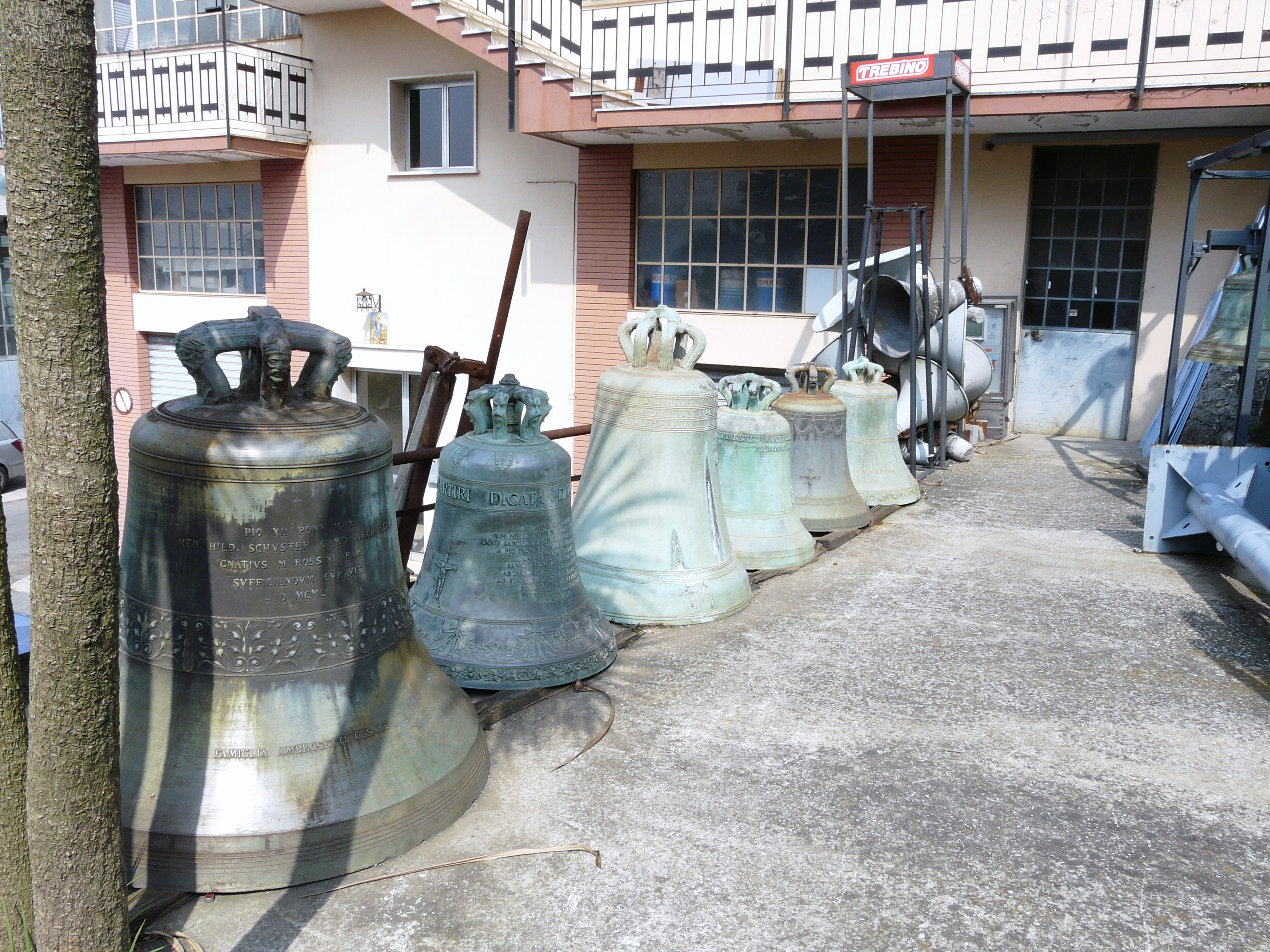 Particolari di campane e componenti presenti all'esterno del Museo dell'orologio da torre "Roberto Tubino" di Uscio, Liguria, Italia